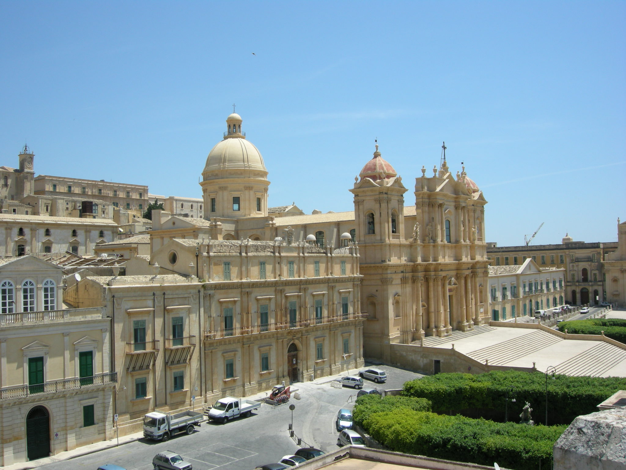 Noto, duomo 03.1